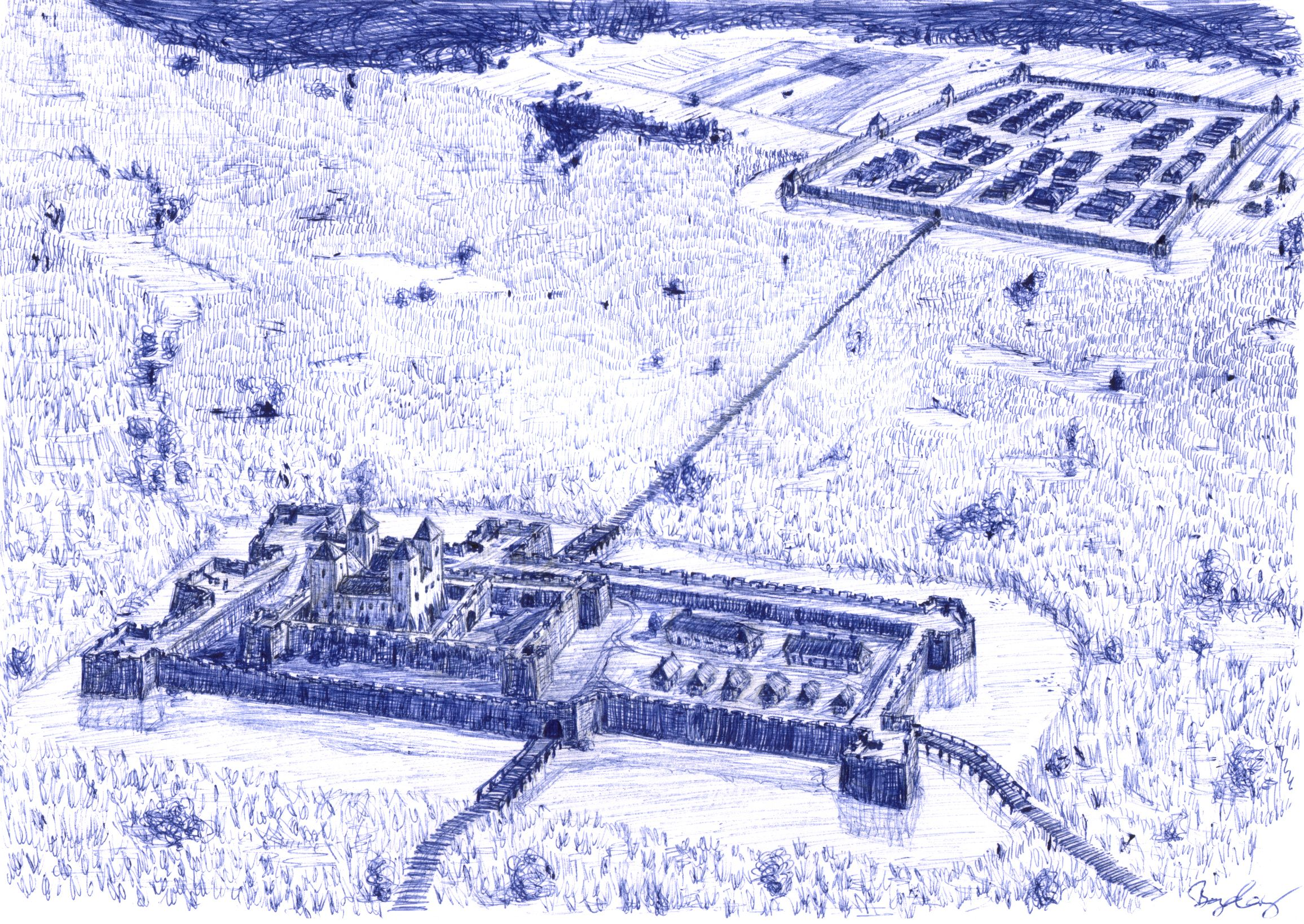 Kanizsa vára Thury György kapitánysága idején nyugat felől nézve. A vár magja a Kanizsai család által a 14. század végén építtetett négytornyú várkastély. Ezt veszi körül a középső és a külső vár. A várkastély kivételével az egész vár földből és fából épült a mocsár közepén. A háttérben a szintén fallal kerített Kanizsa mezővárosa látható. A várostól délre, a falakon kívül áll a Szent Margit templom. A Thury György halálát követő években a vár védműveit teljesen átépítették